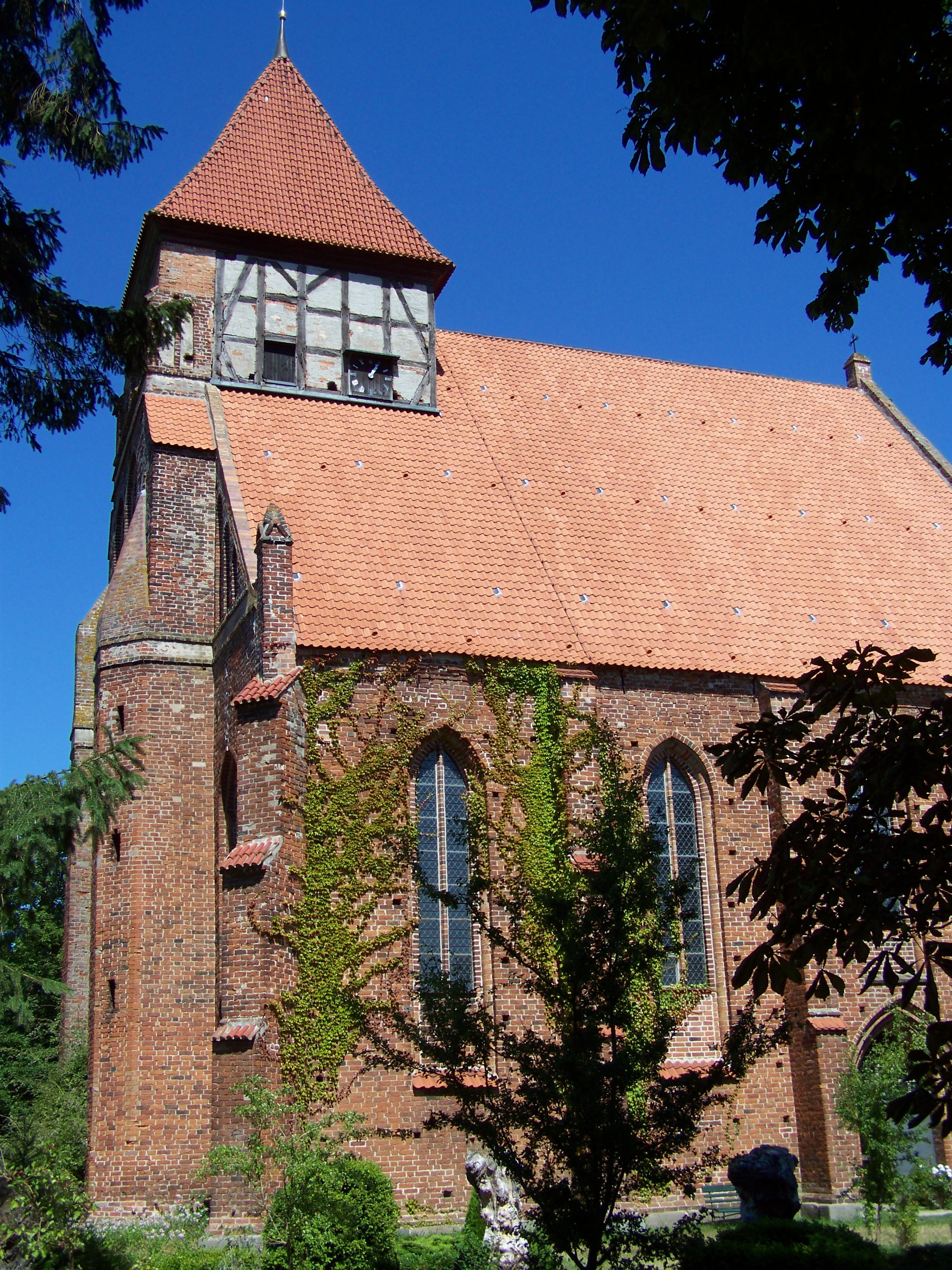 Brandshagen, Nordvorpommern, Dorfkirche, Ansicht